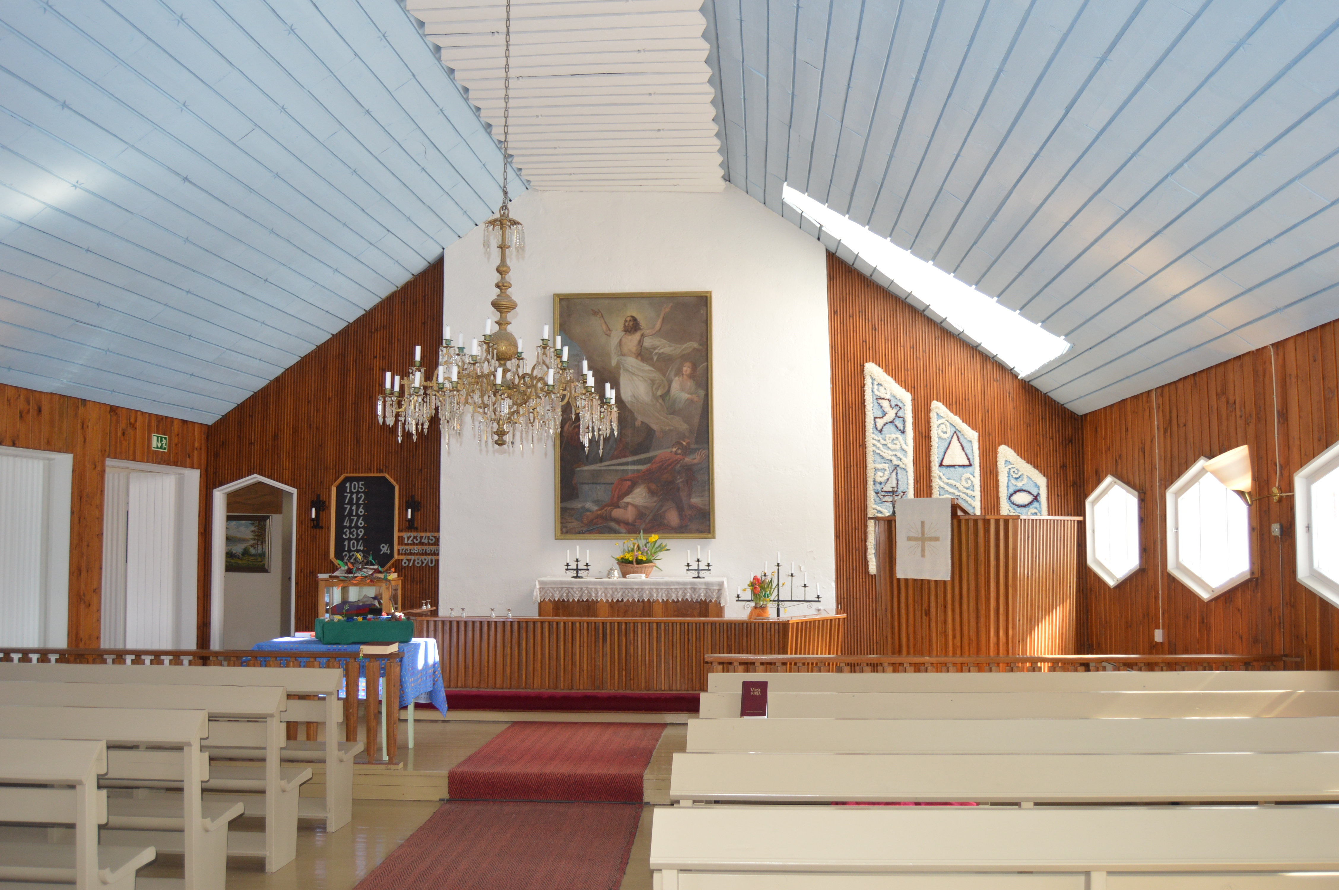 Joensuun Hoilolan kyläkirkko sisältä